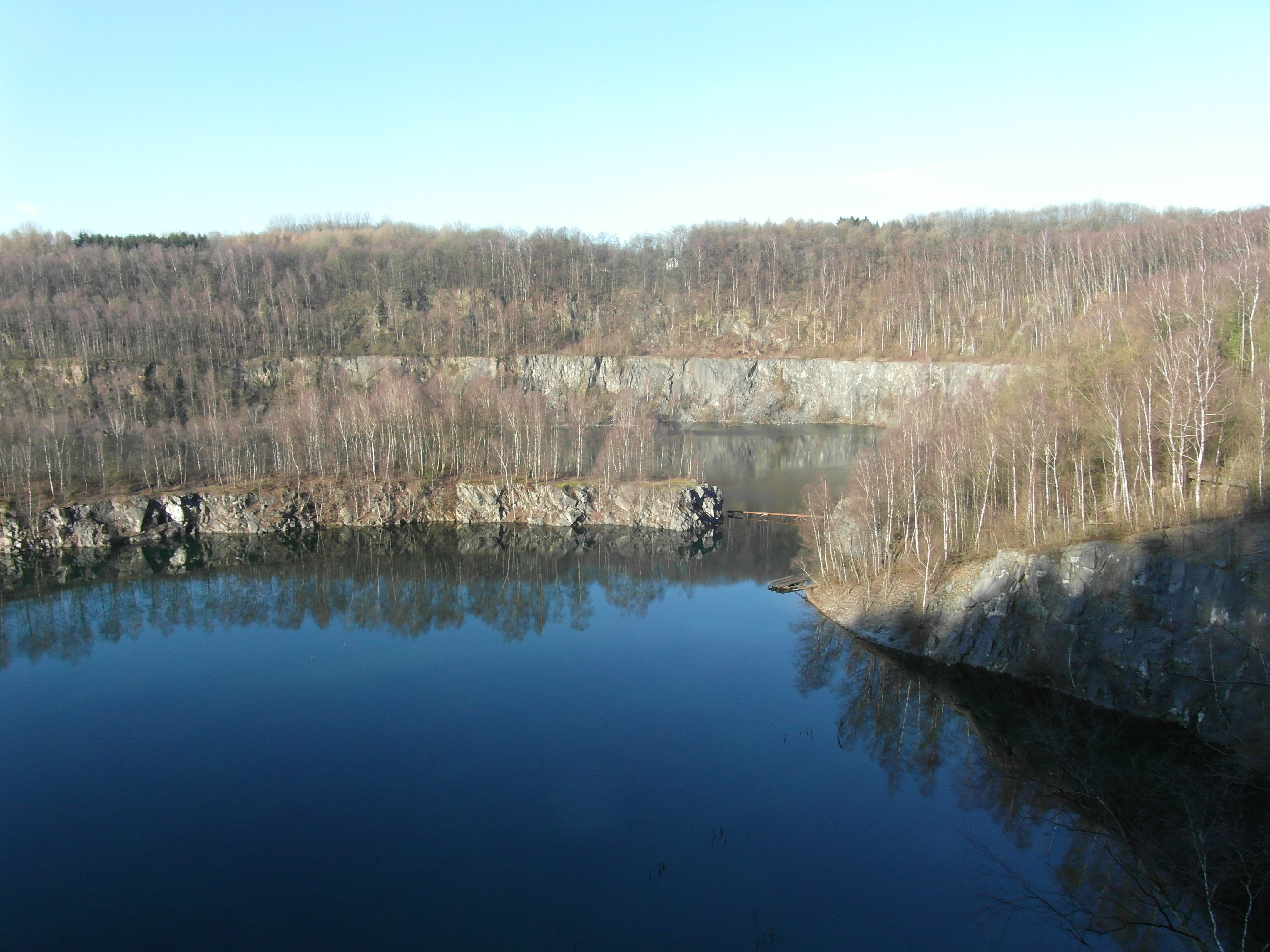 Wülfrath